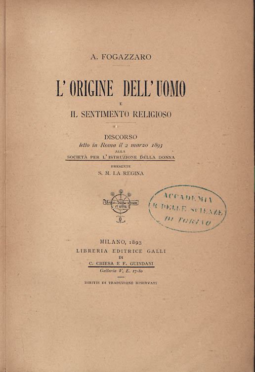 L' origine dell'uomo e il sentimento religioso : discorso letto in Roma il 2 marzo 1893 alla Società per l'istruzione della donna / da A. Fogazzaro. - Milano : Libreria editrice Galli di C. Chiesa e F. Guindani, 1893. - 109, 13 p. ; 21 cm . frontespizio